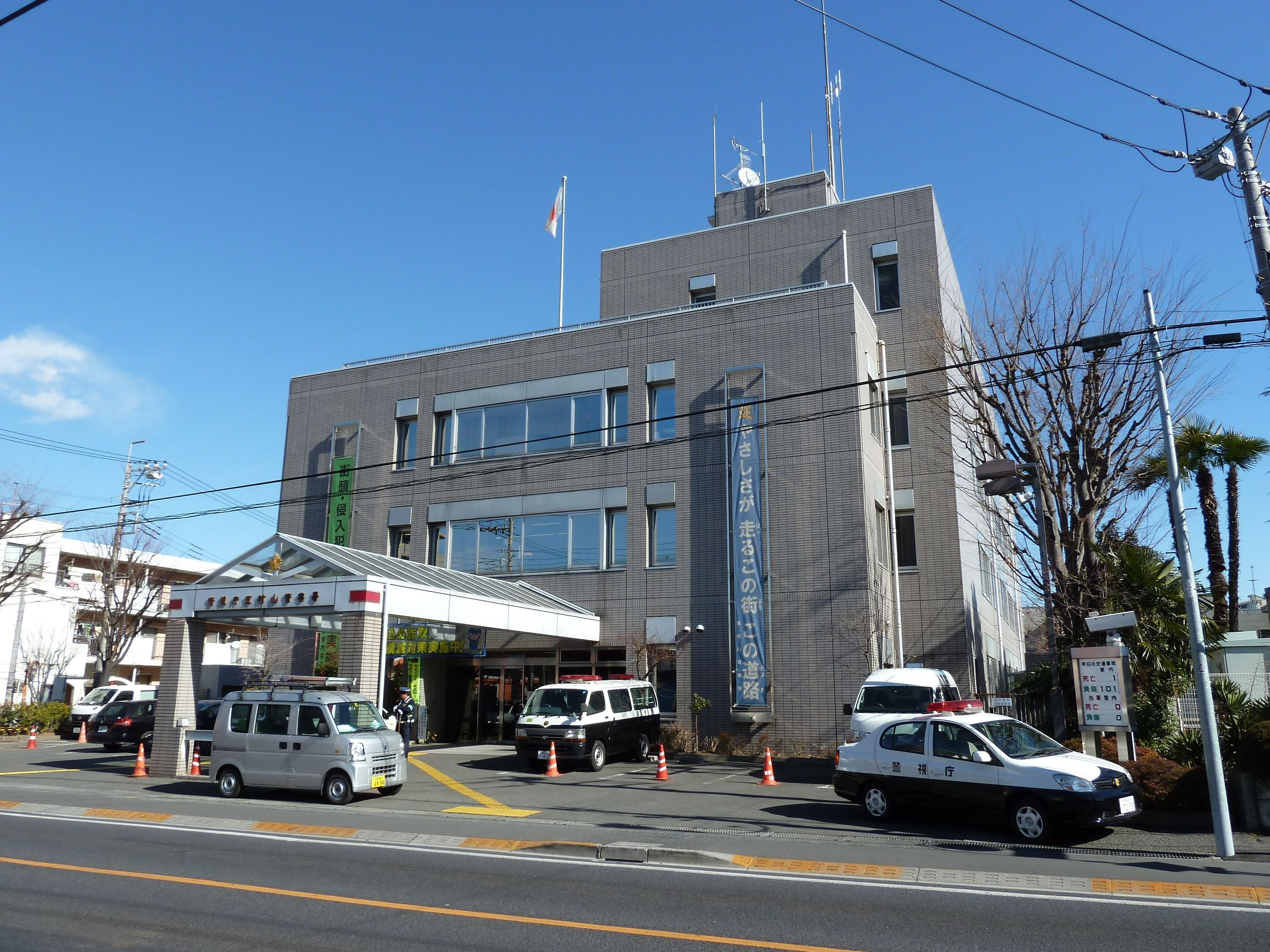 東村山警察署